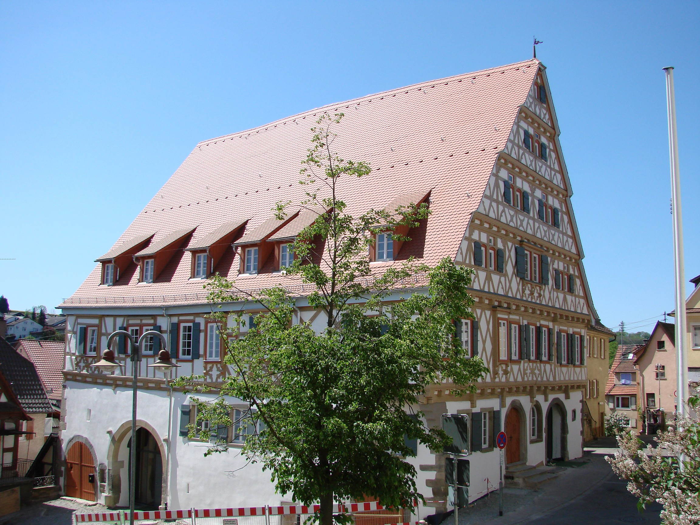 Enzweihingen, Großes Haus (big house) of 1622